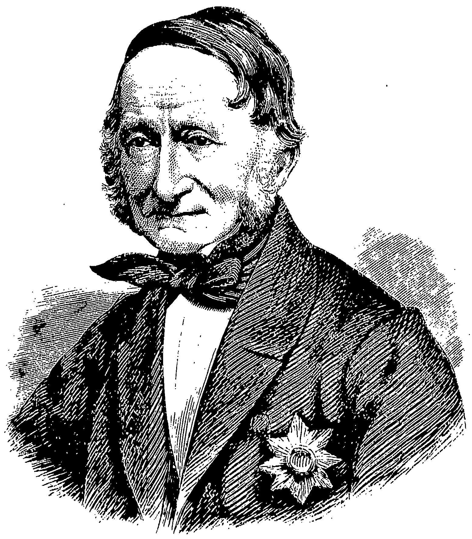 Den norske astronomen Christopher Hansteen.